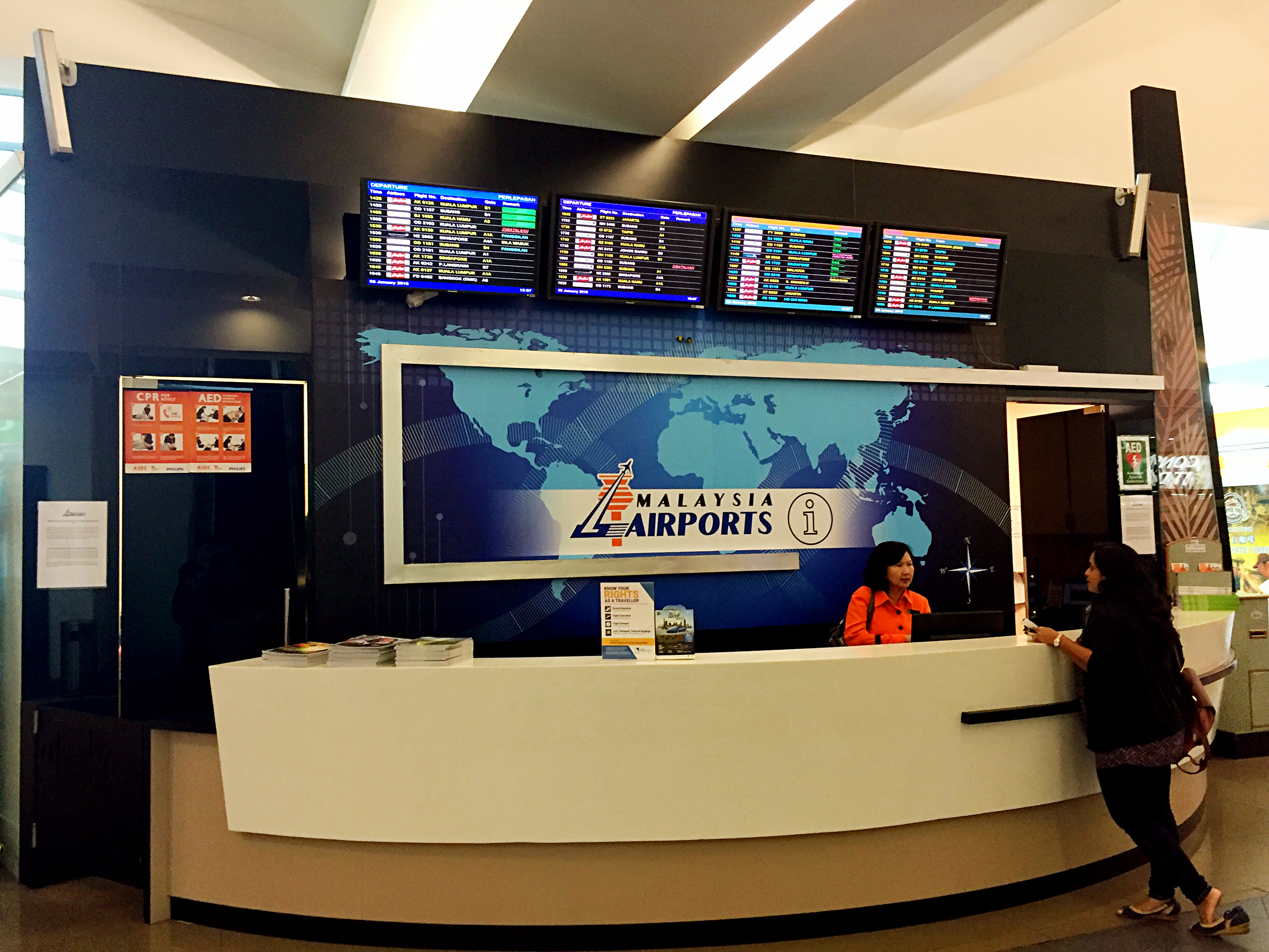 槟城国际机场询问柜台